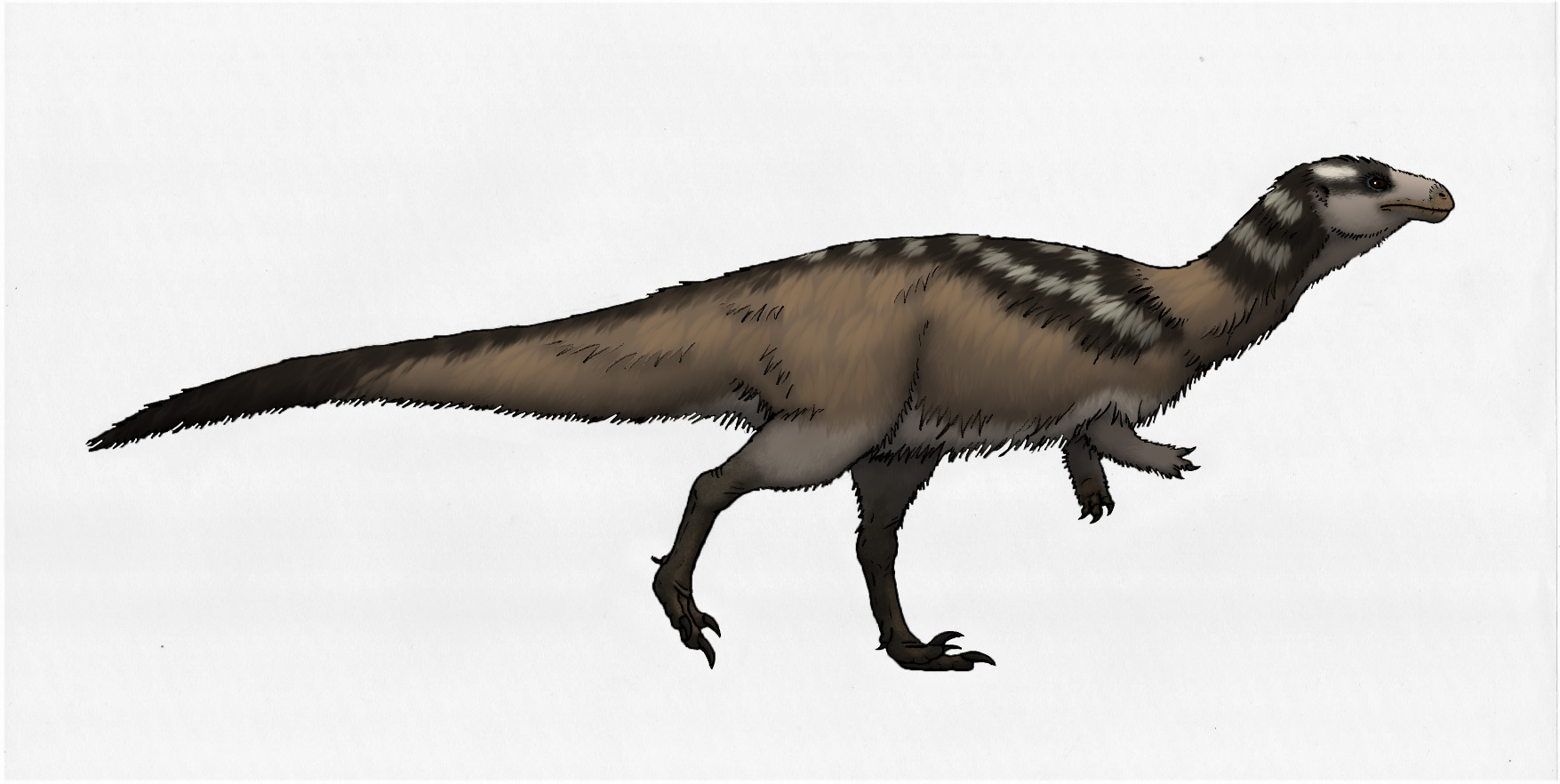 Vespersaurus paranaensis. Credits to Rodolfo Nogueria.